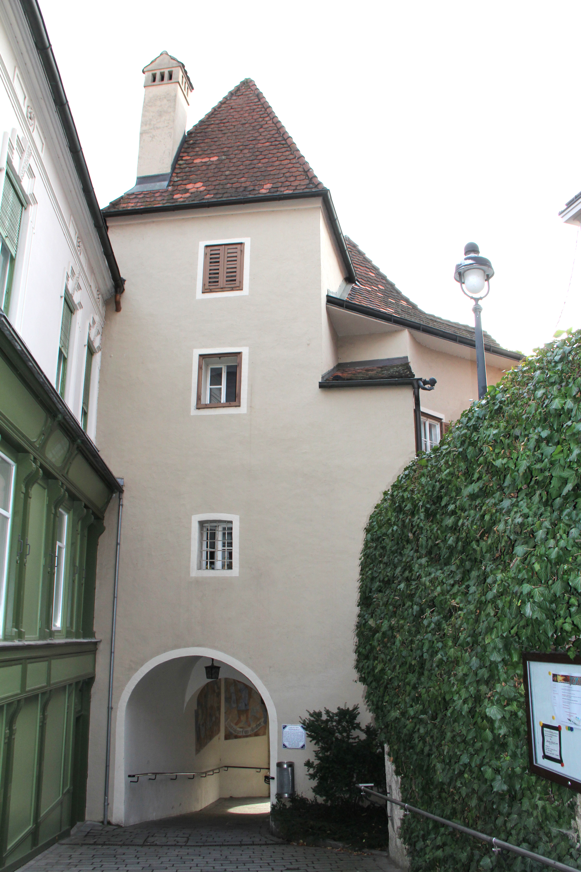 Torbau, ehem. Tabor